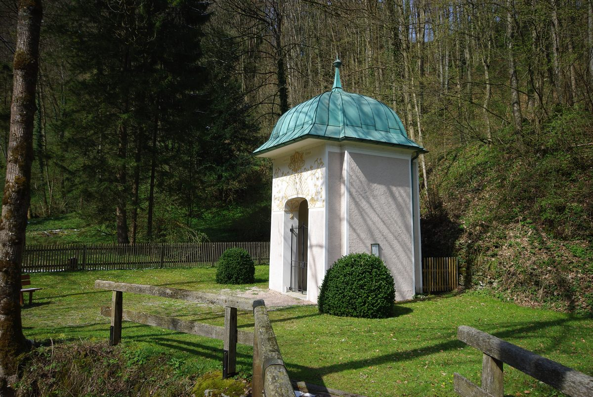 Seebachkapelle in Bad Reichenhall, ThumseestraßeThis is a photograph of an architectural monument.